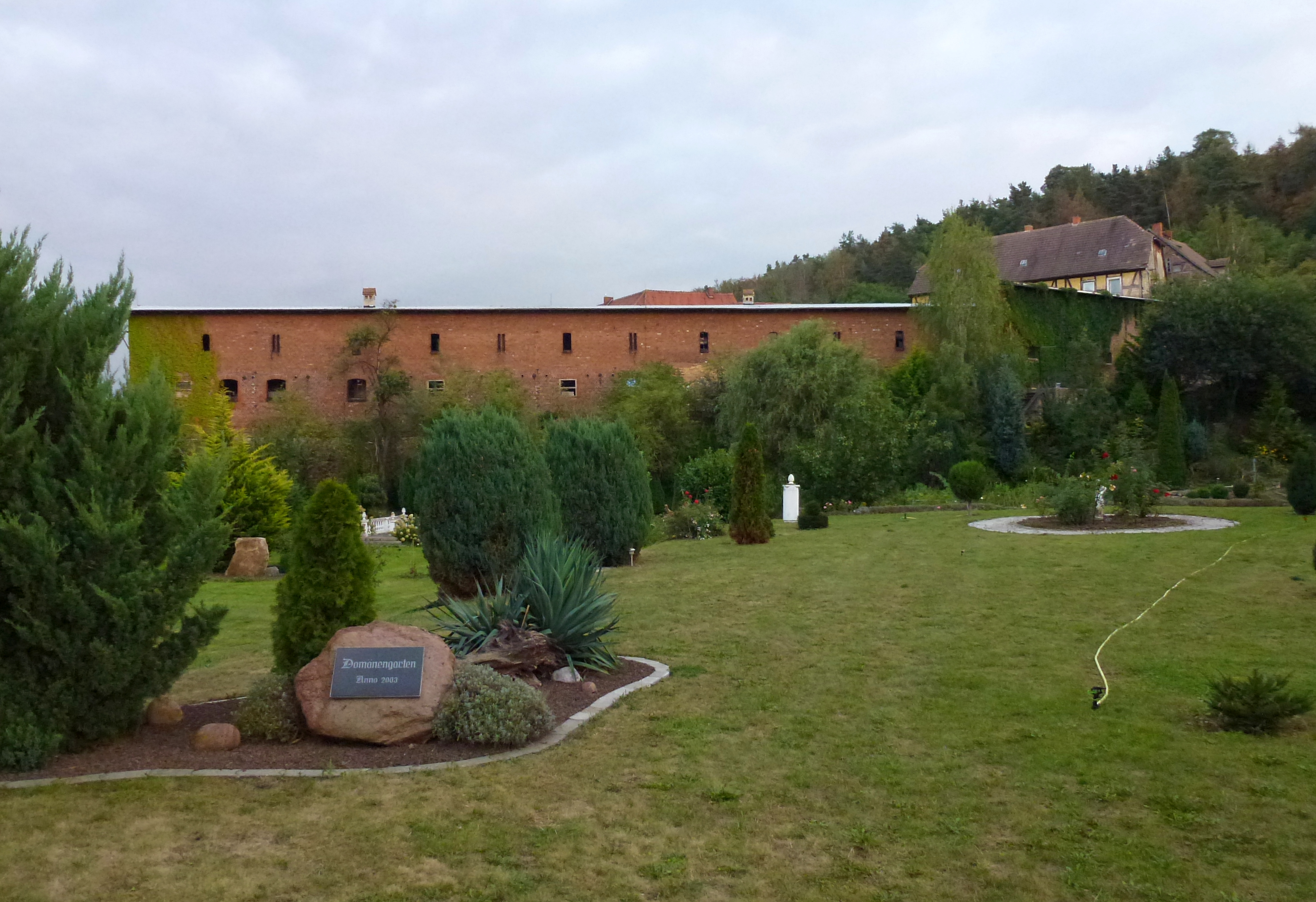 Domäne Opperode